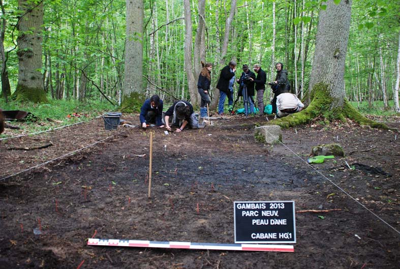 Fouille archéologique de la cabane de Peau d'Âne (Demy, 1970) dans le parc du Château de Neuville à Gambais